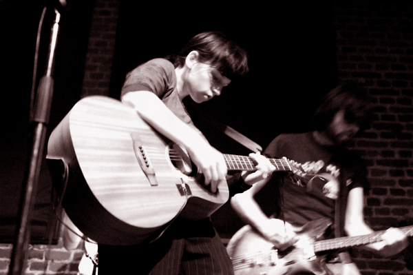 Julia Hummer im Marburger KFZ 2005